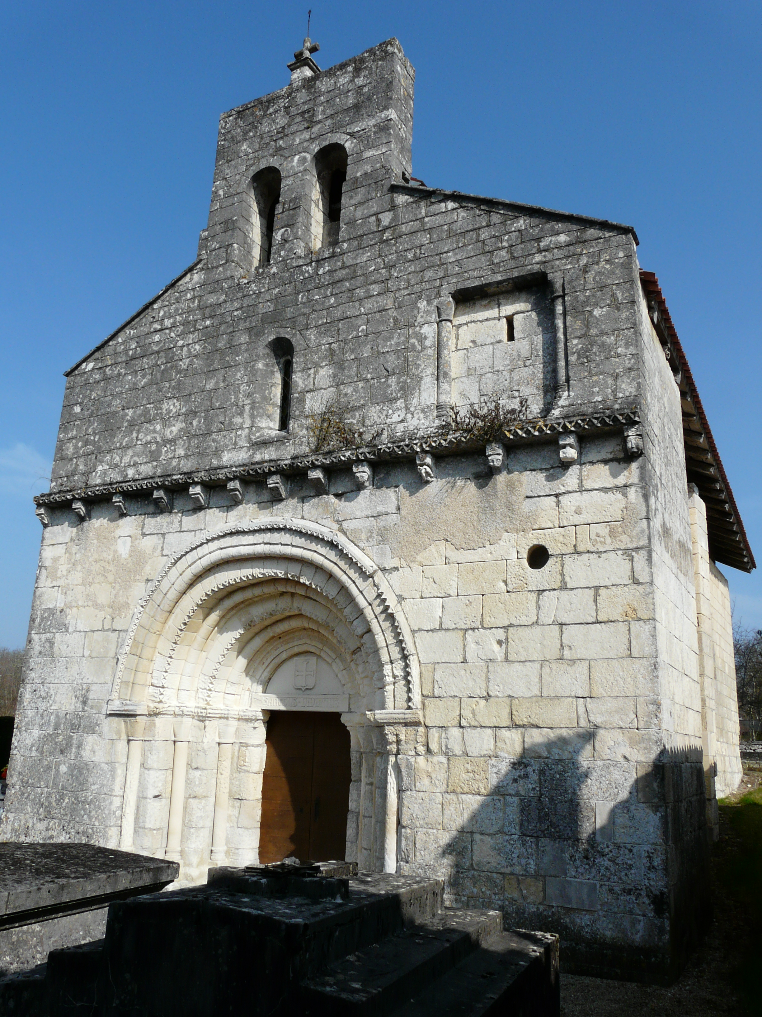 Le clocher-mur de l'église Saint-Vivien, Paussac-et-Saint-Vivien, Dordogne, France.